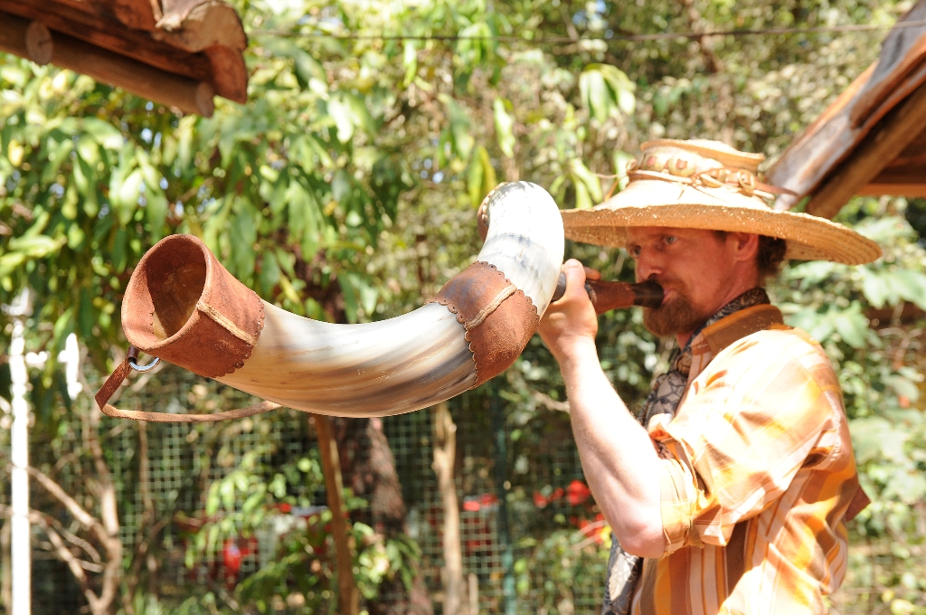 Vaqueiro toca o berrante em Barretos (SP)